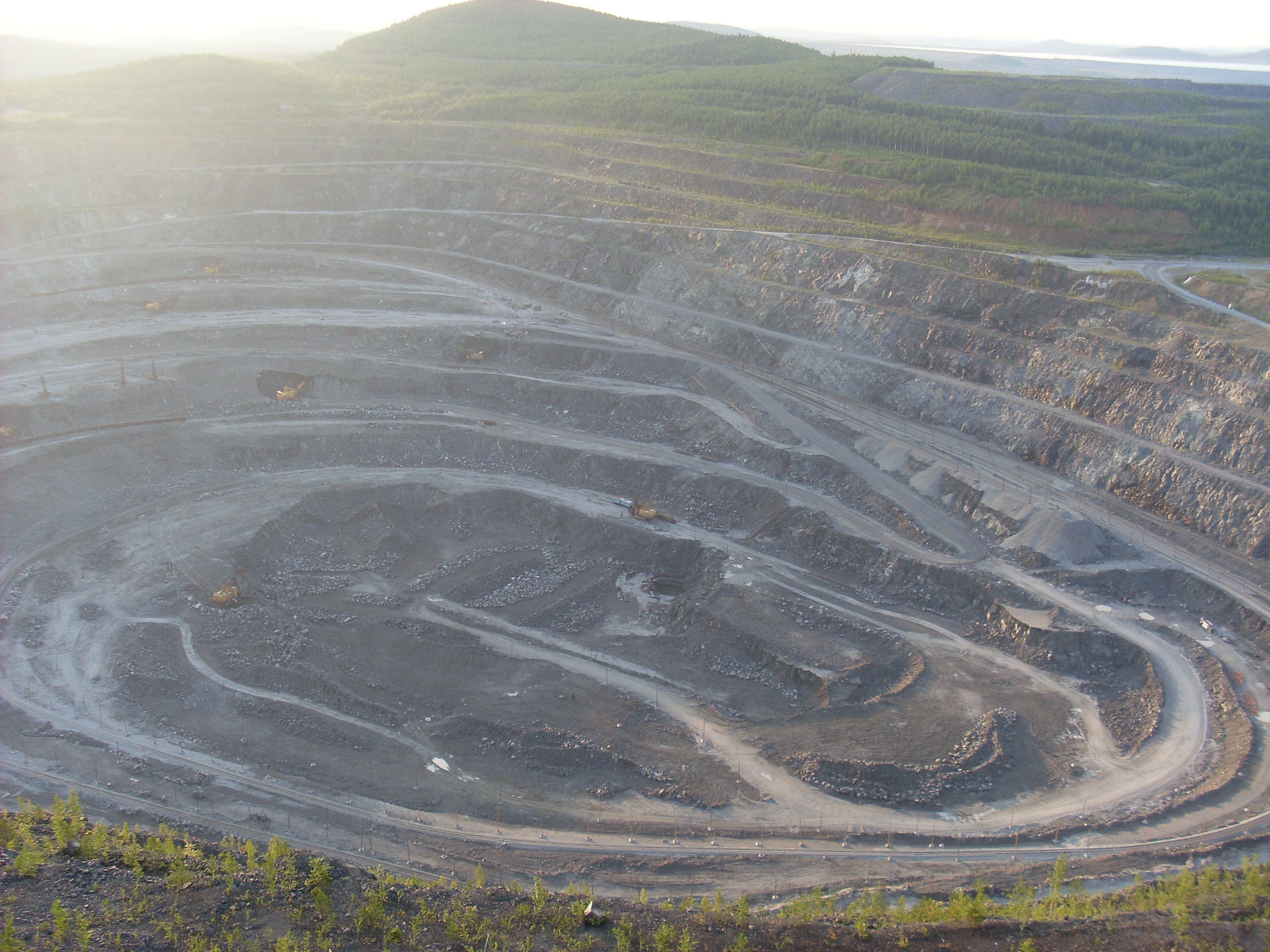 Карьер Горнообогатительного комбината г. Качканар